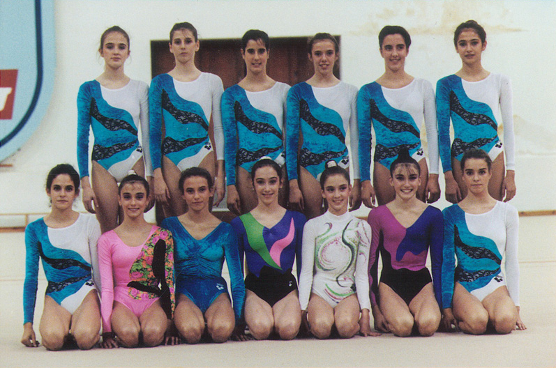 Selección nacional de gimnasia rítmica de España de 1991 en el Gimnasio Moscardó (Madrid). De pie, de izquierda a derecha: Bito Fuster, Isabel Gómez, Cristina Chapuli, Débora Alonso, Marta Aberturas y Montse Martín. Sentadas, de izquierda a derecha: Gemma Royo, Carolina Pascual, Carmen Acedo, Mónica Ferrández, Rosabel Espinosa, Noelia Fernández y Lorea Elso.